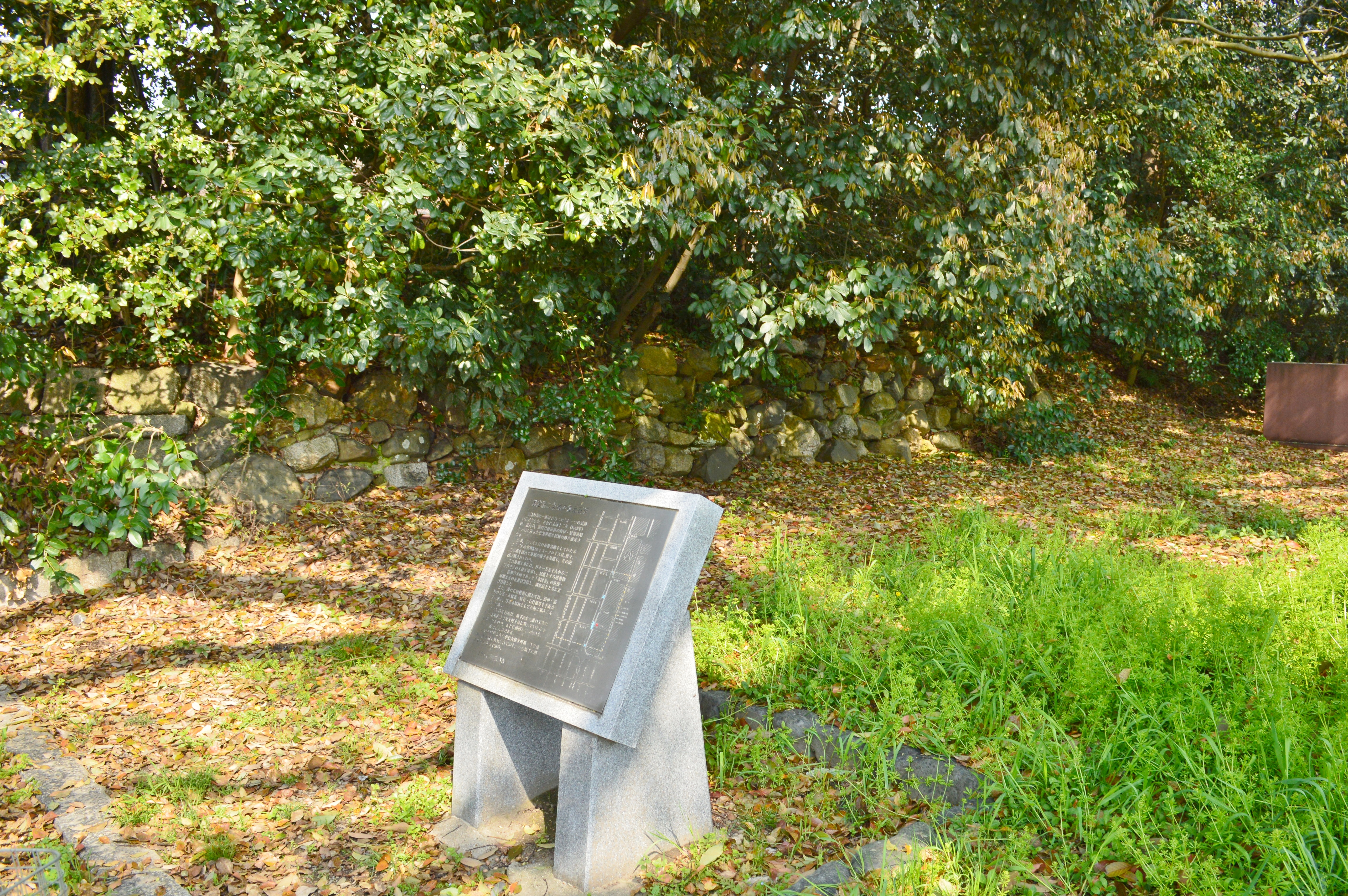 京都御苑内の二条古城石垣